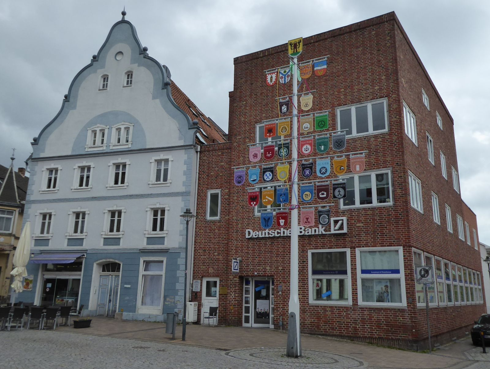 Rathausplatz in Greifswald mit Zunftbaum